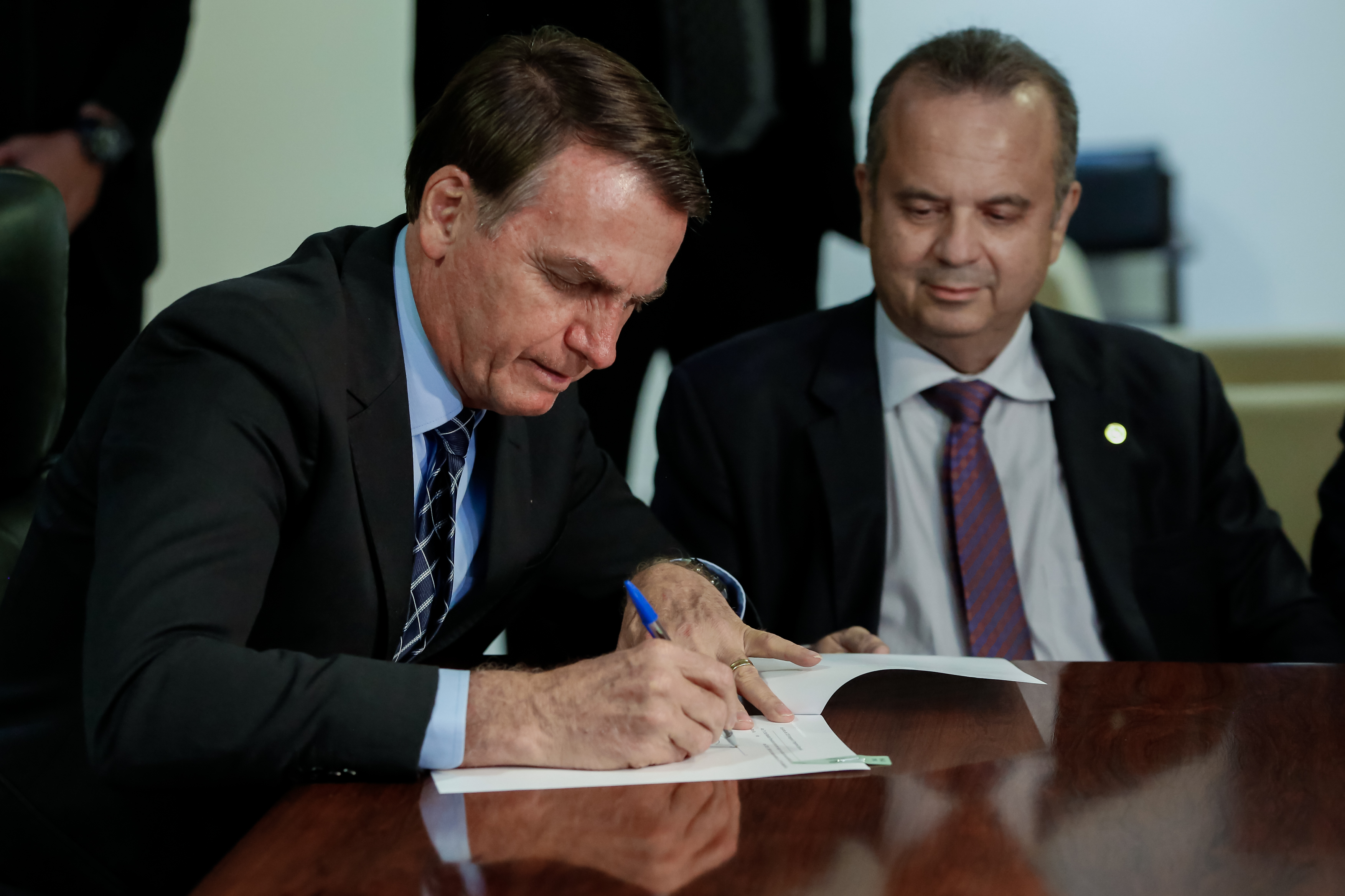 (Brasília - DF, 05/08/2019) Assinatura da Medida provisória que regulamenta a antecipação de 50% do 13º salário de aposentados do INSS. Foto: Carolina Antunes/PR